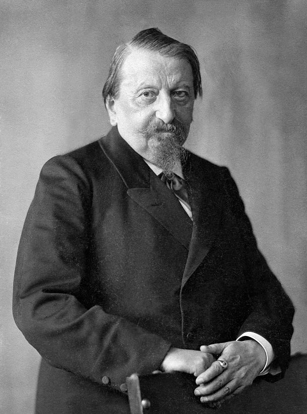 Rudolf von Gottschall